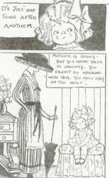 extrait du comics Dimple